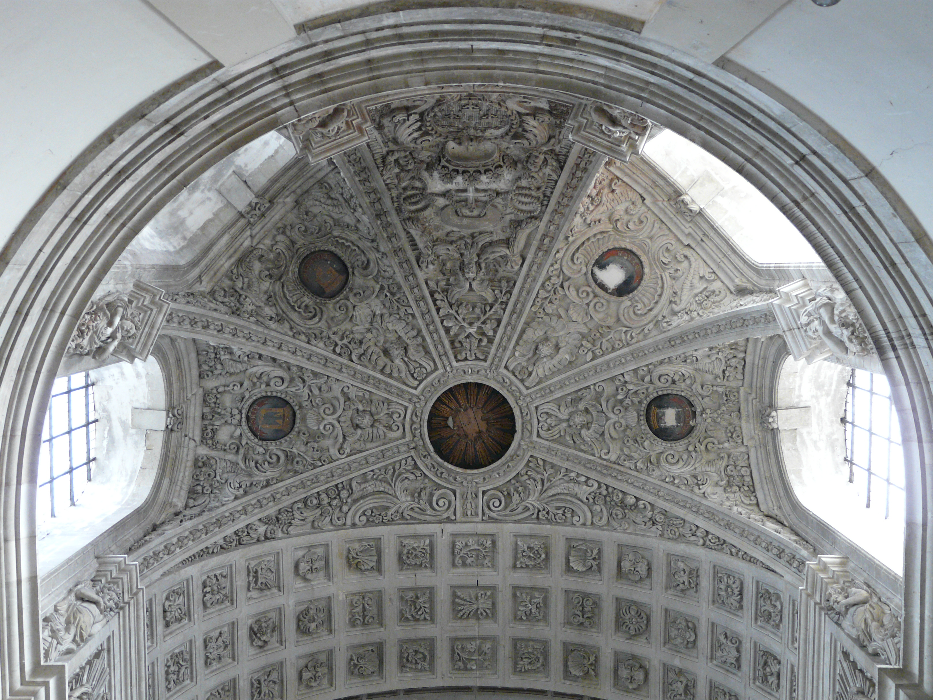 Voûte du choeur de la chapelle des Jésuites ("du grand séminaire") à Cambrai